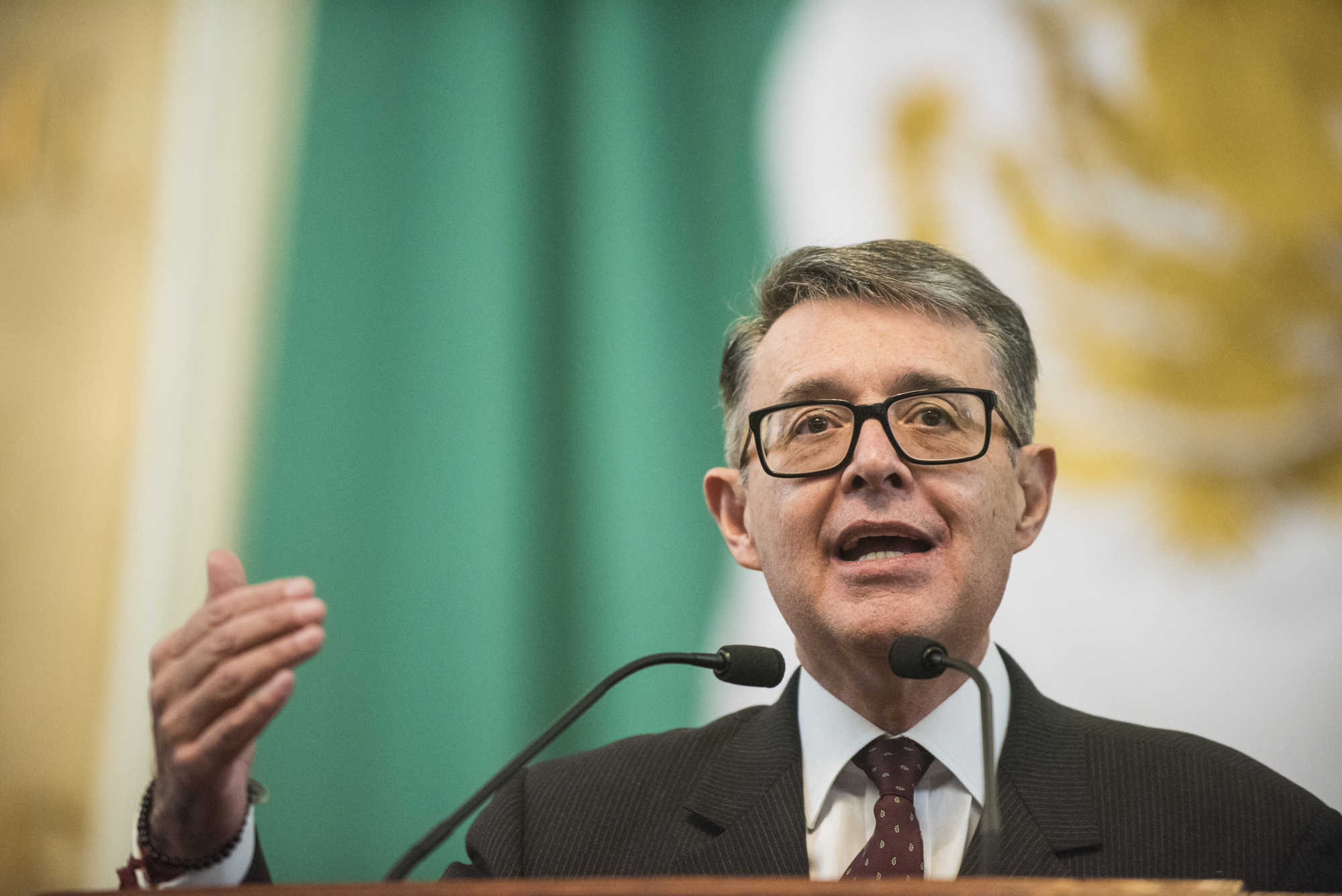 El periodista y político mexicano, José Alfonso Suárez del Real y Aguilera, habla en la tribuna de la Asamblea Legislativa del Distrito Federal. En 2015 fue electo diputado por el Distrito XII local